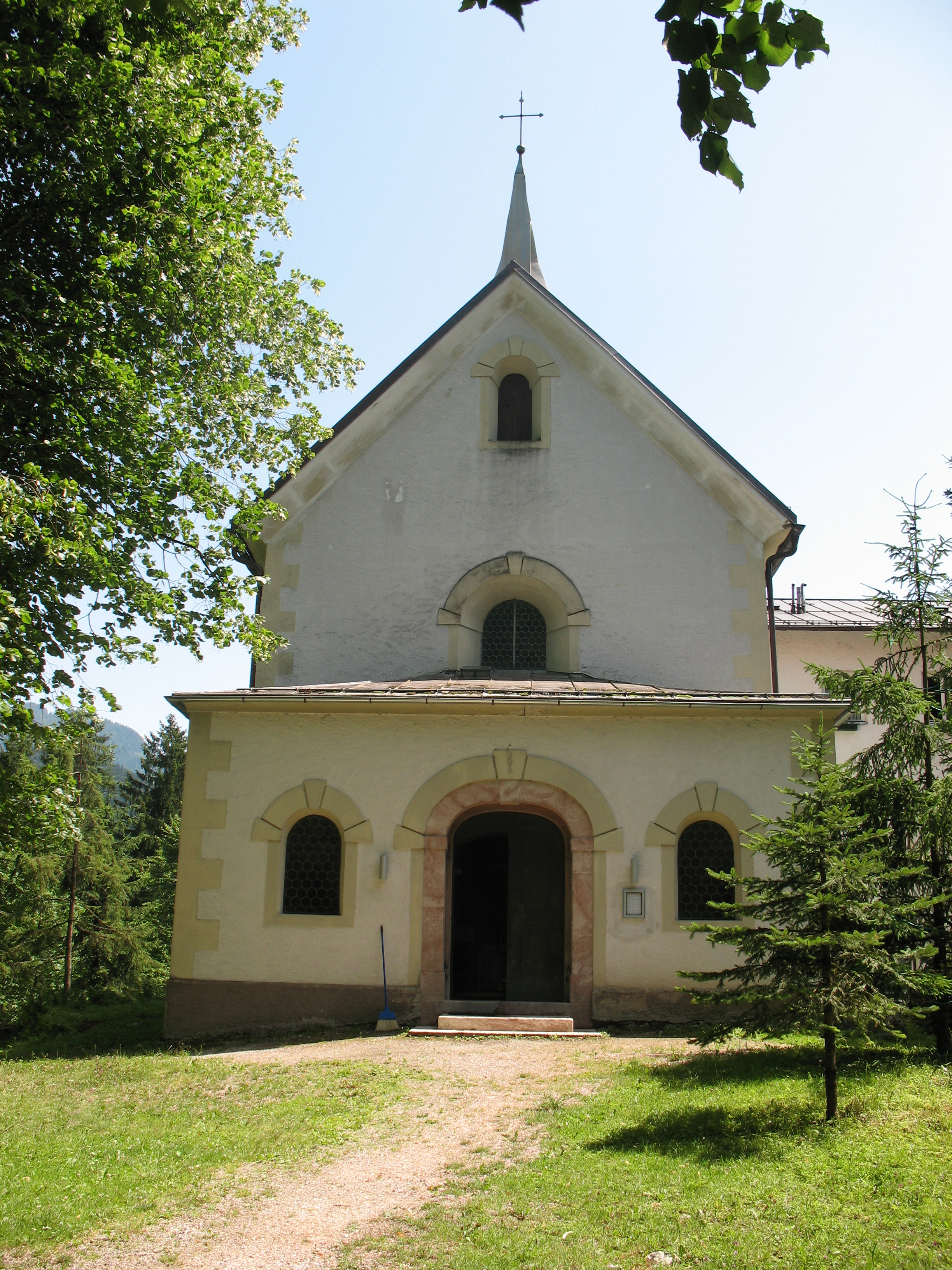 Wallfahrtskapelle Hilaribergl (Maria auf dem Karmel) und ehem. Marienhospiz